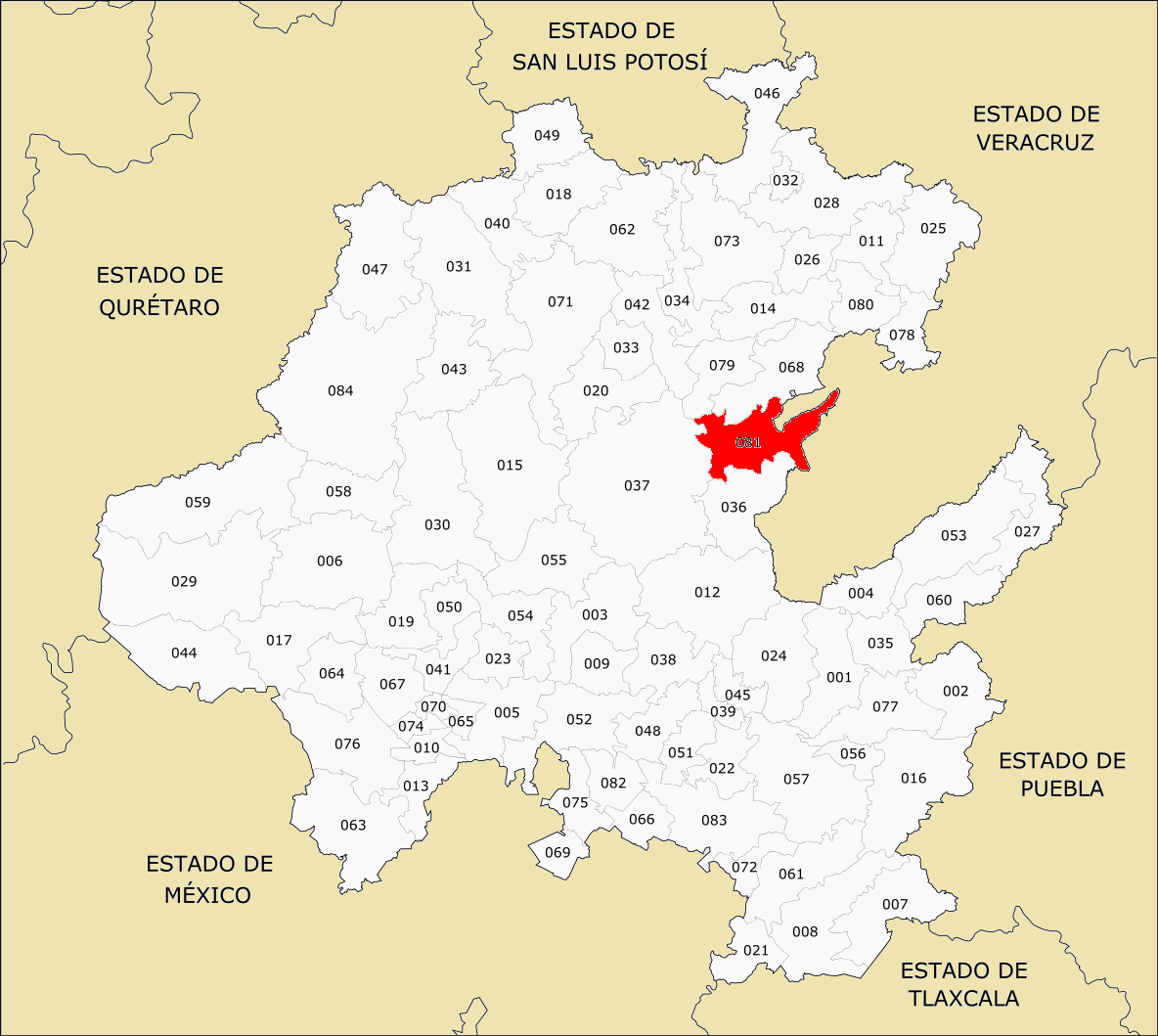 Municipios de Hidalgo